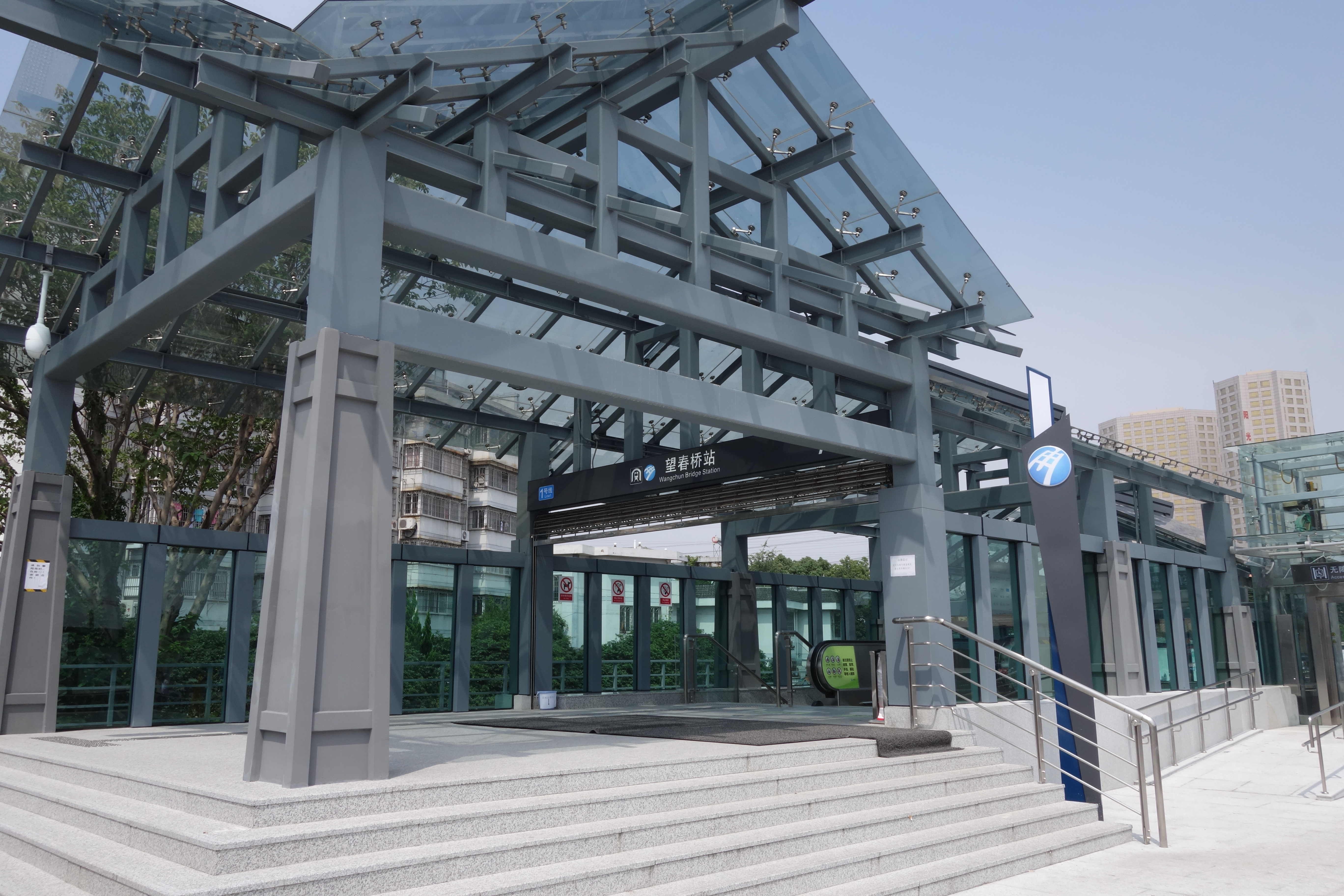 望春桥站A出口